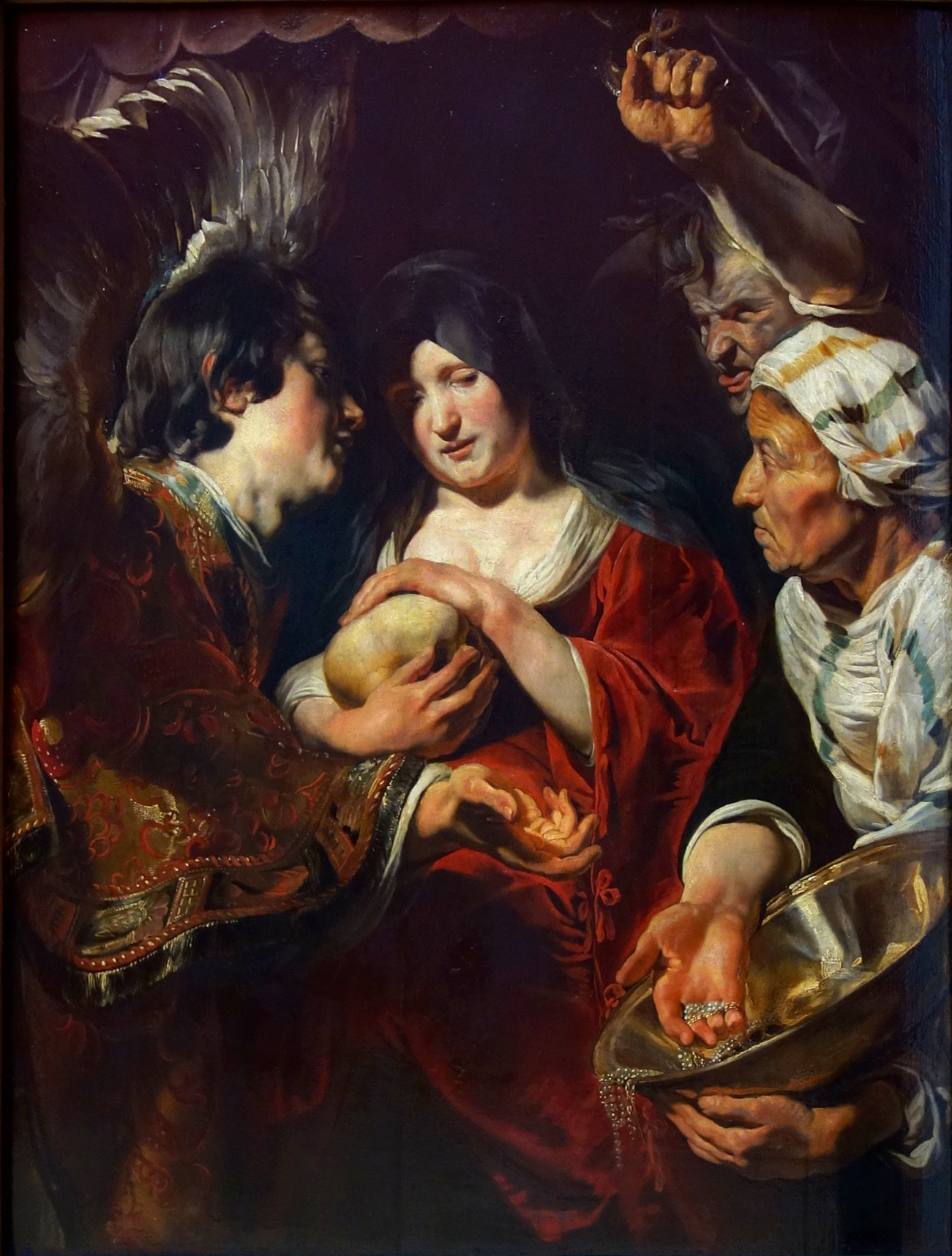 La tentation de sainte Madeleine.label QS:Lfr,"La tentation de sainte Madeleine."